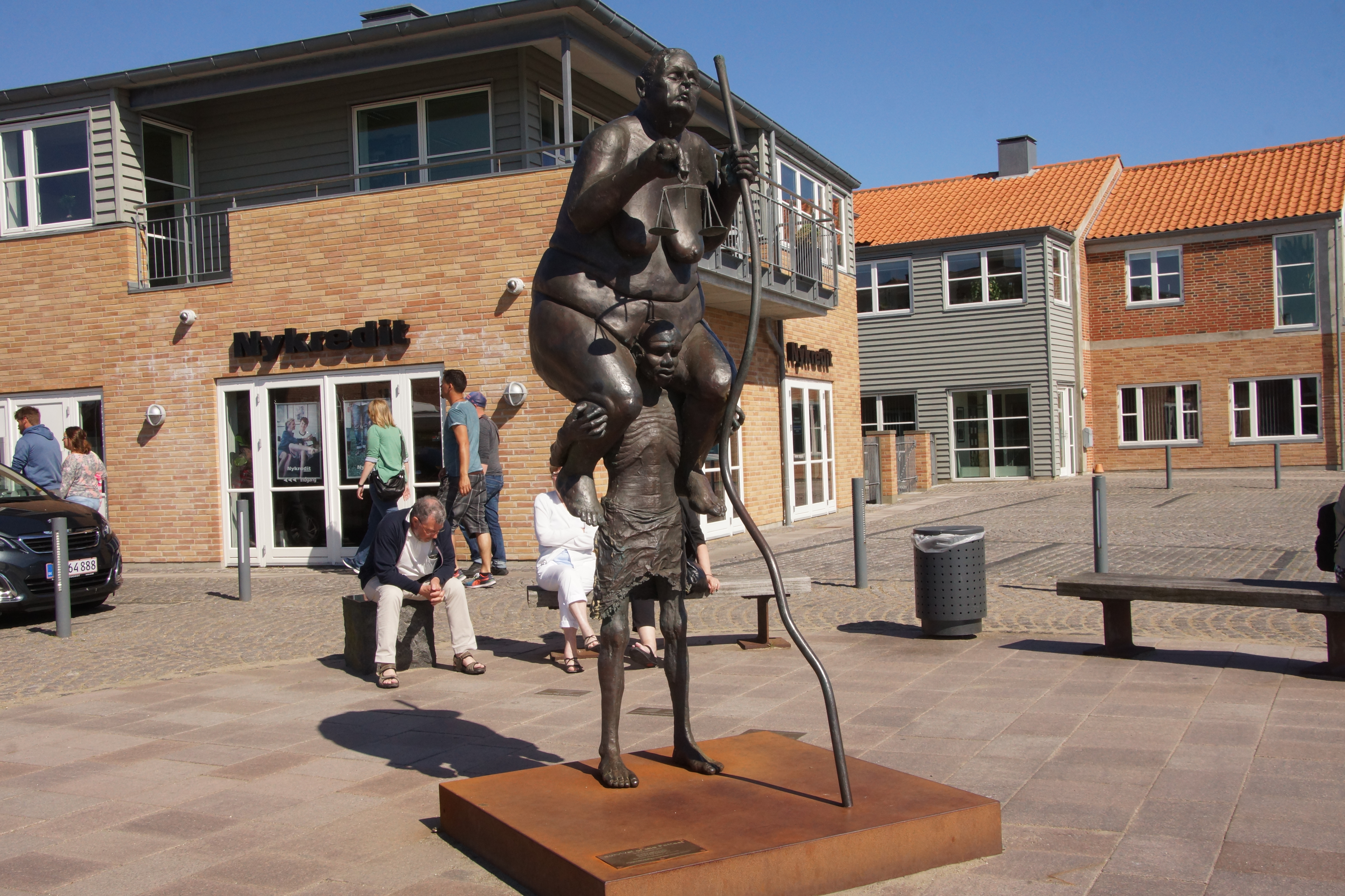 Emancipatie in Denemarken